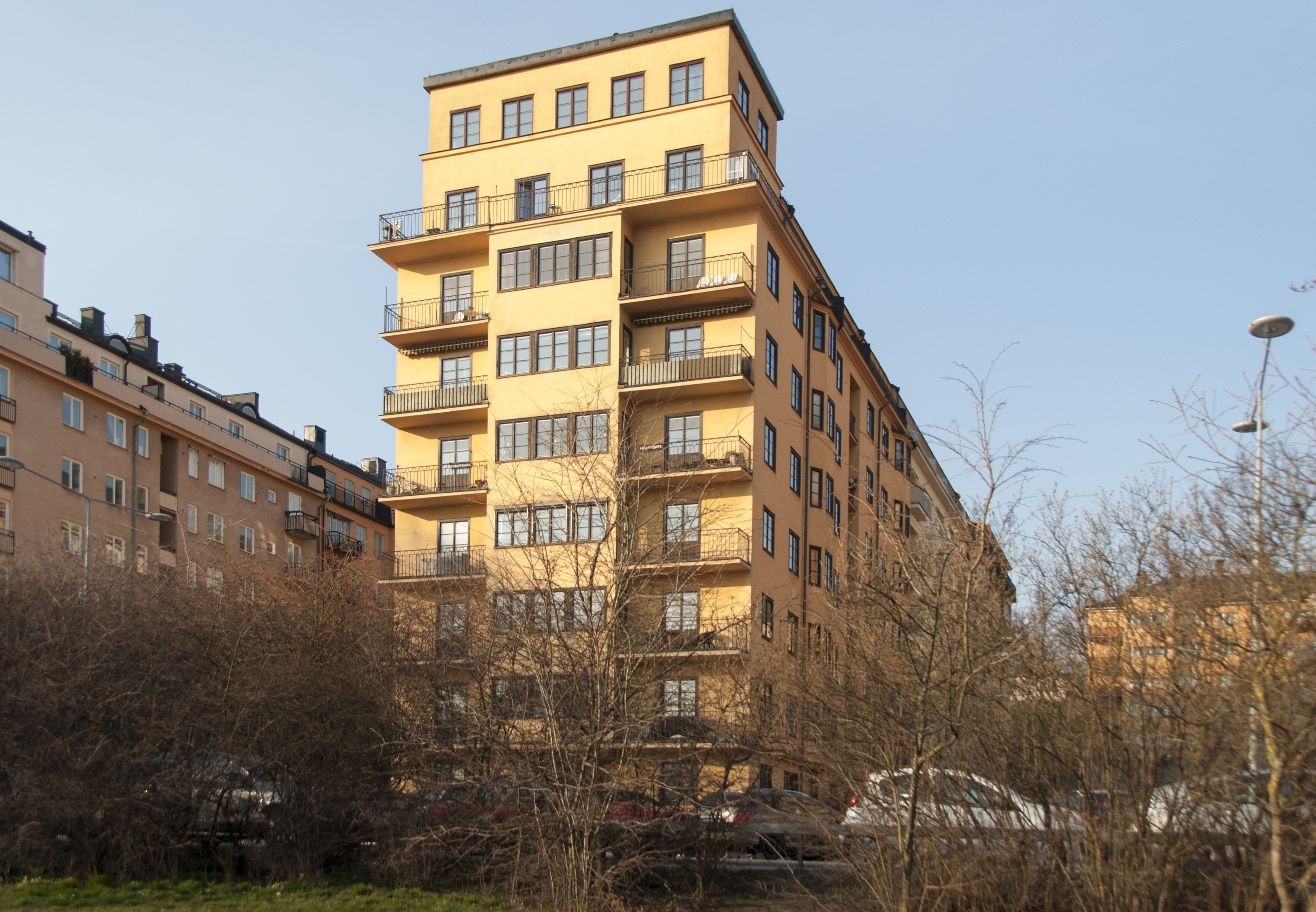 Pontonen 7, Ehrensvärdsgatan 1, Norr Mälarstrand 66, Nybyggnadsår 1930 - 1931, Alma Hedin (Byggherre) Olle Engkvist (Byggmästare) Theodor Kellgren (Arkitekt)